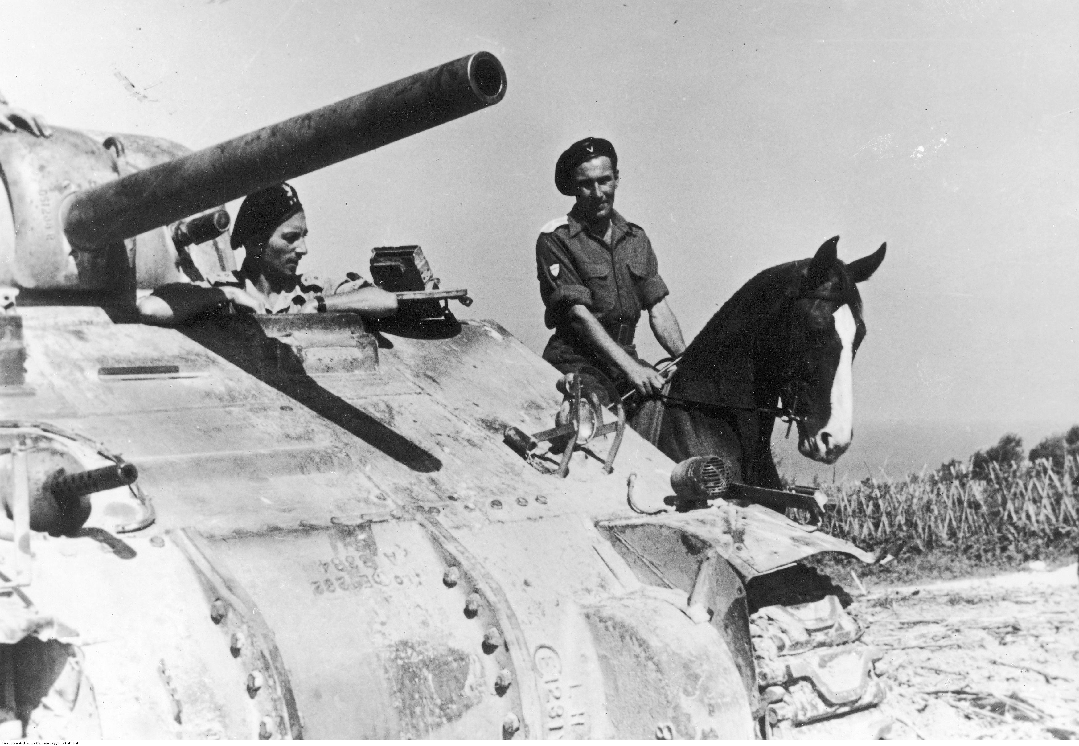 Zluzowane oddziały 2 Korpusu Polskiego po walkach na Linii Gotów. Wachmistrz 1 Pułku Ułanów Krechowieckich ze zdobycznym koniem "Lalą" obok czołgu M4 Sherman. Archiwum Fotograficzne Tadeusza Szumańskiego. Sygnatura: 24-496-4